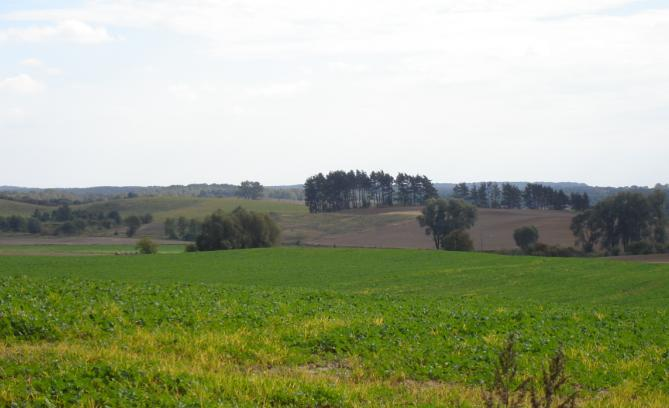 Pojezierze Choszczeńskie, autorka: H.Ciszewska-Czyż